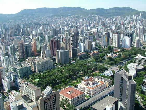 Arquivo pessoal.